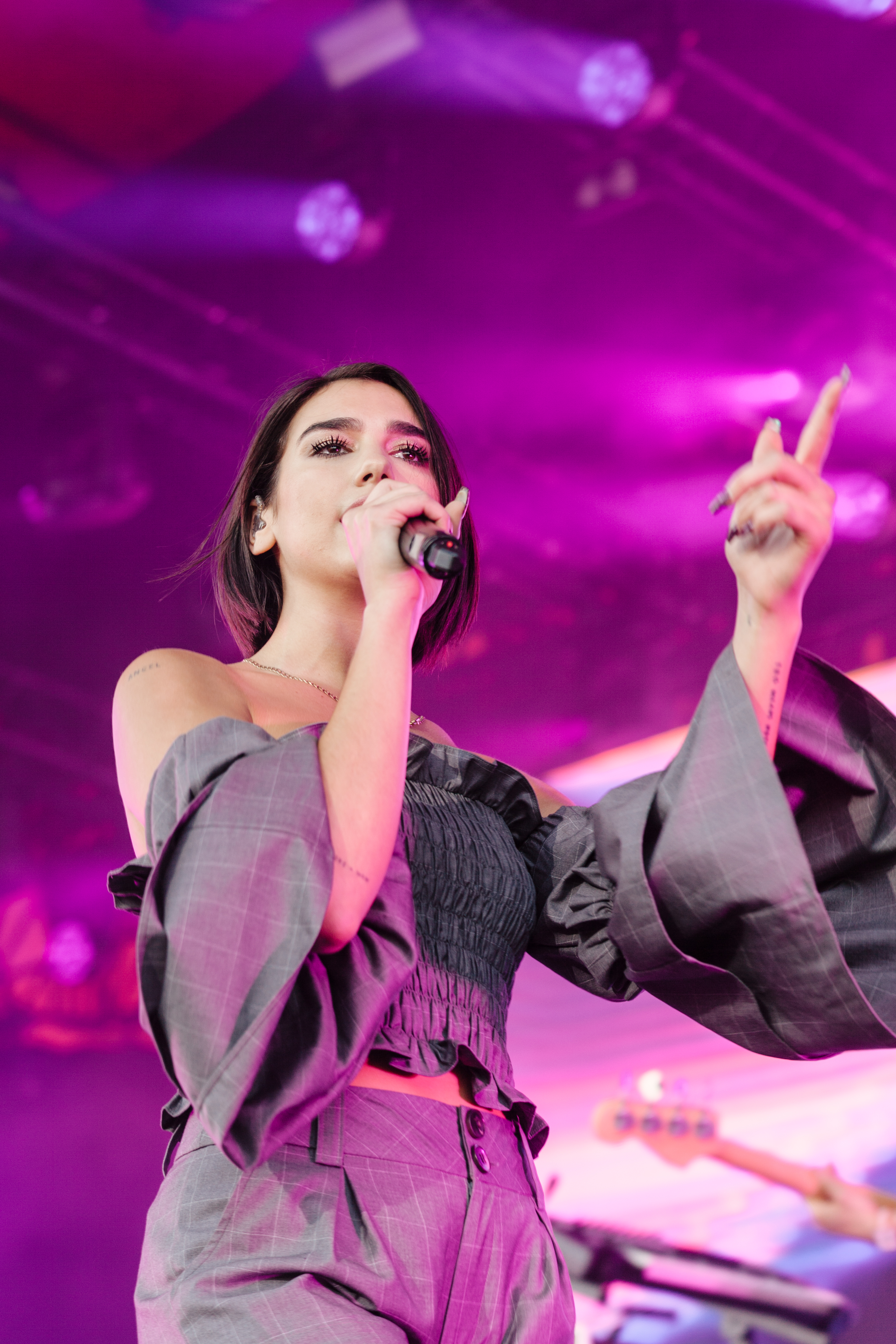 Festivalsommer This photo was created with the support of donations to Wikimedia Deutschland in the context of the CPB project "Festival Summer".